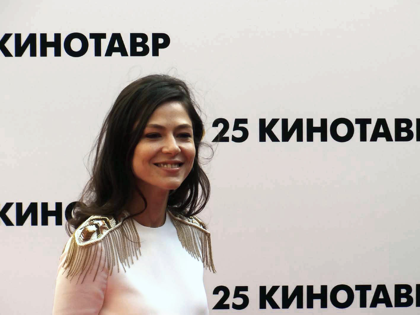 Елена Игоревна Лядова — российская актриса театра и кино. Церемония открытия фестиваля "Кинотавр -2014" в Сочи.